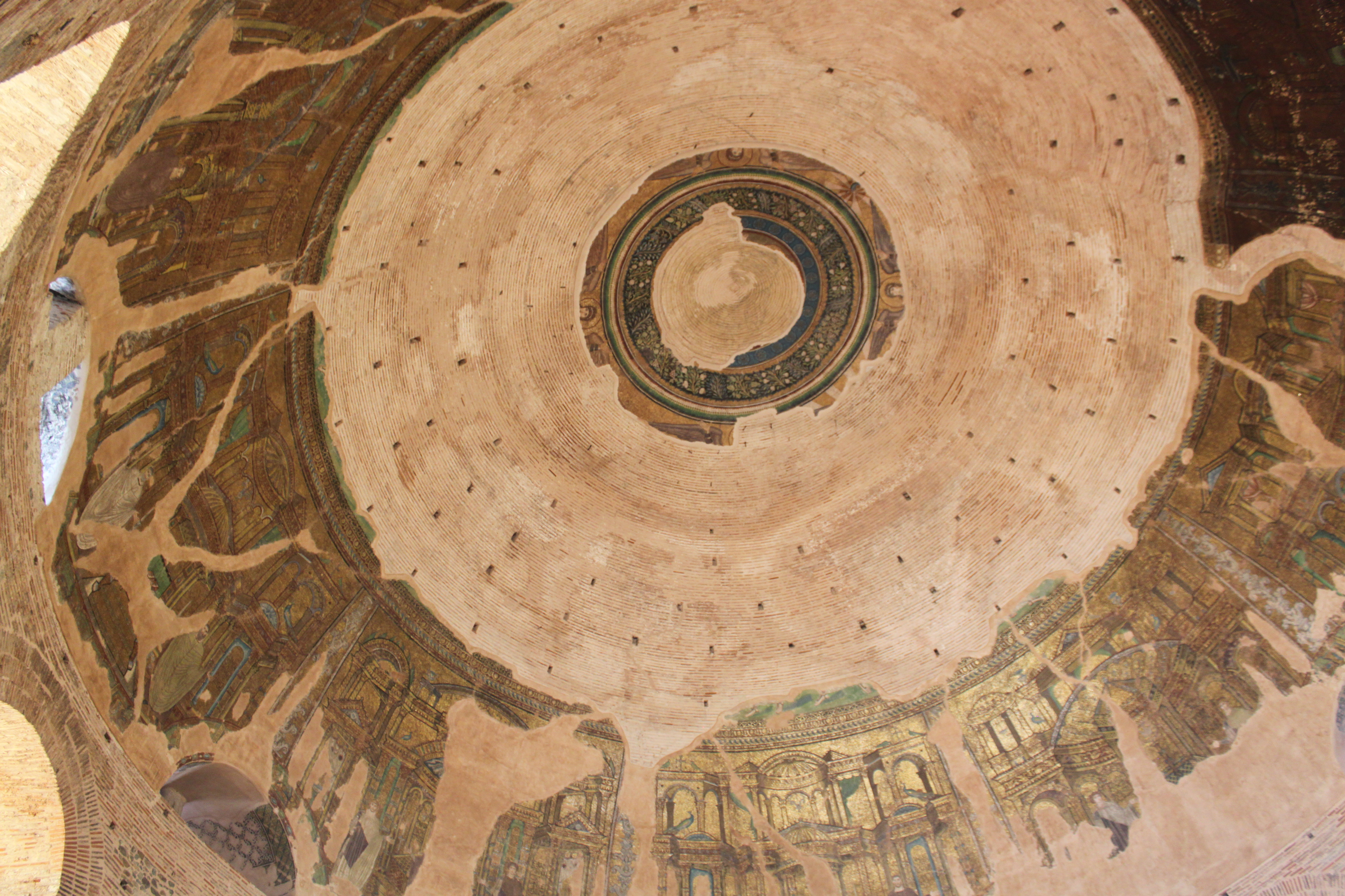 Coupole de la Rotonde de Thessalonique